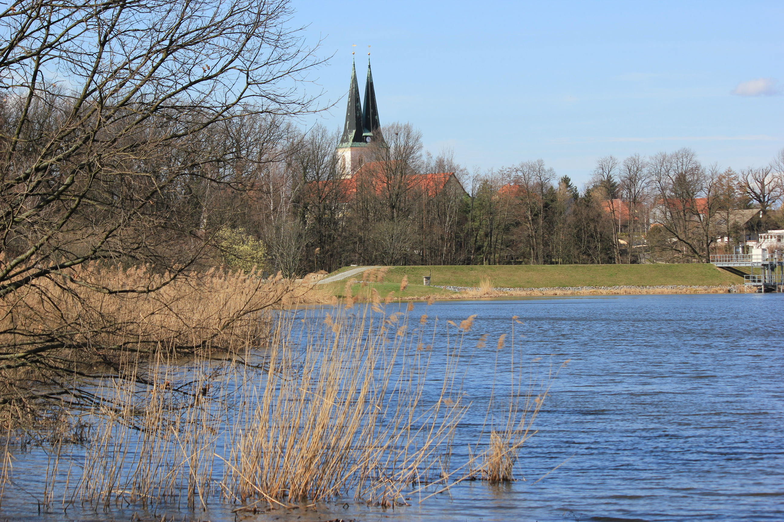 Hornjoserbsce: Při Hodźijskim spjatnišću